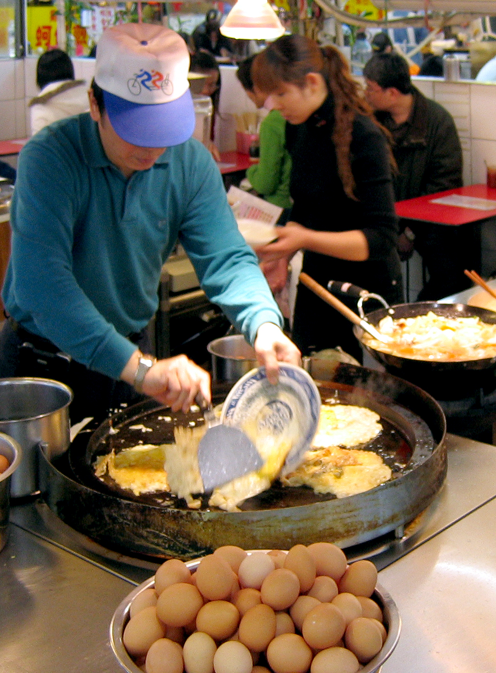 士林夜市的蚵仔煎攤位